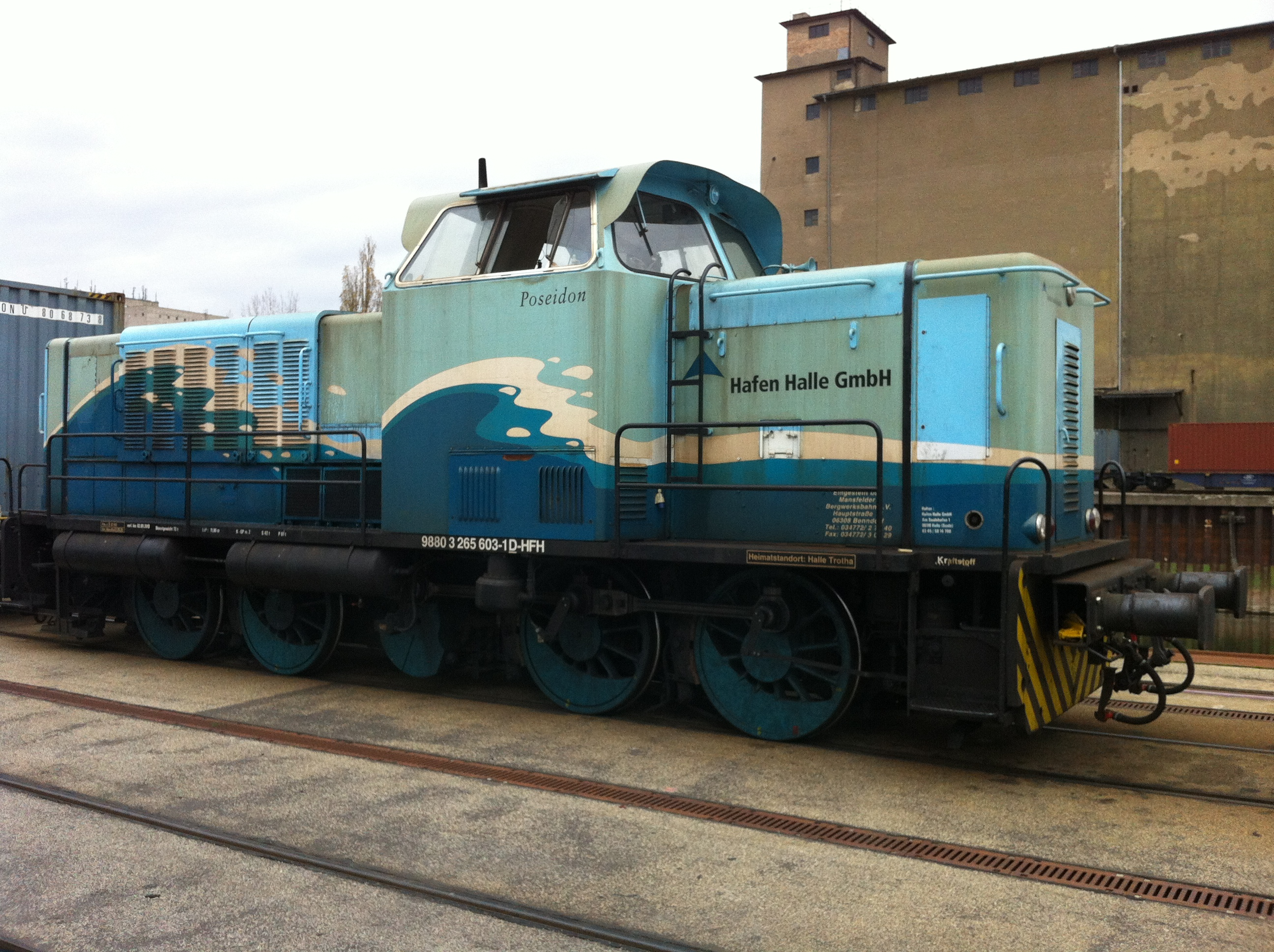 Lokomotive MaK 1200 Dm der Hafenbahn Halle. Name: Poseidon. Fahrzeugregistriernummer 98 80 3265 603-1 D-HFH